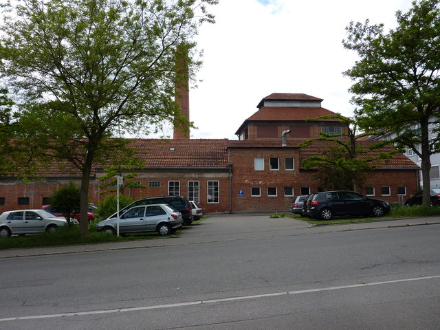 Böblingen: Schönbuchbräu